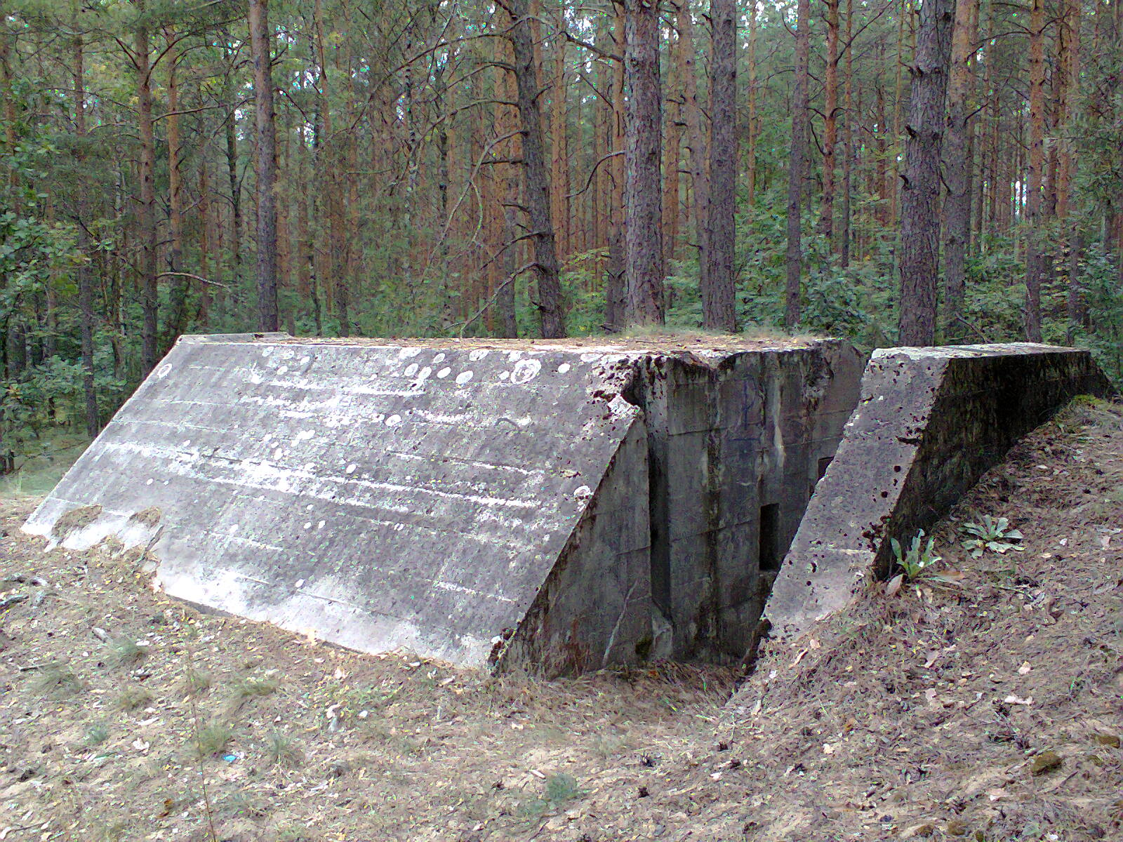 Schron w Trzcińskich (powiat kolneński)